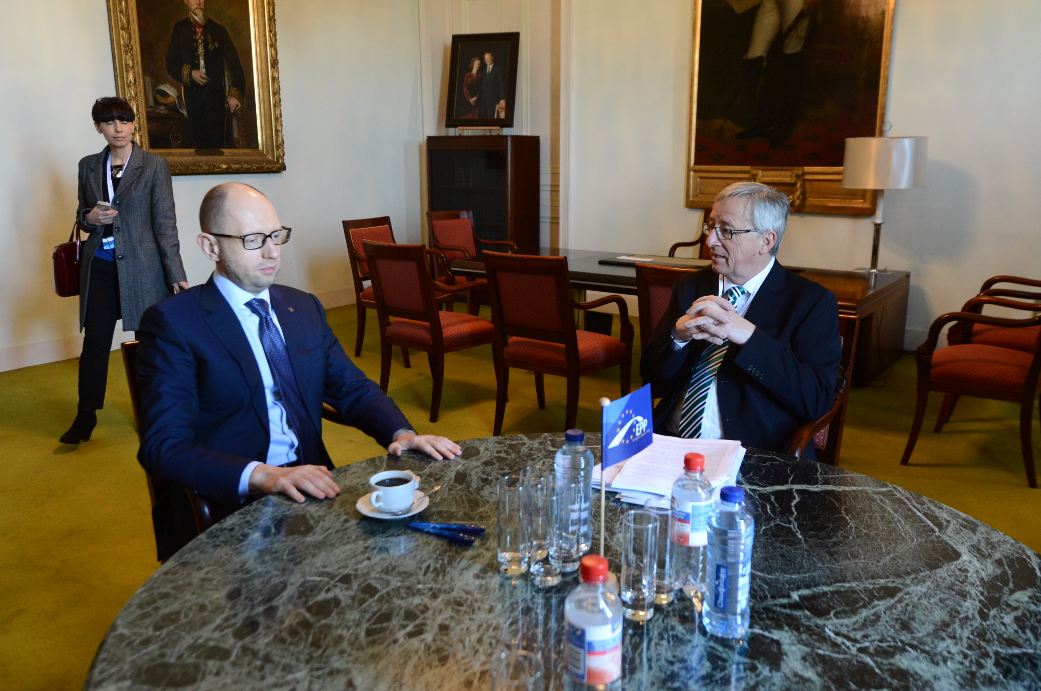 EPP Brussels Summit; Mar. 2014